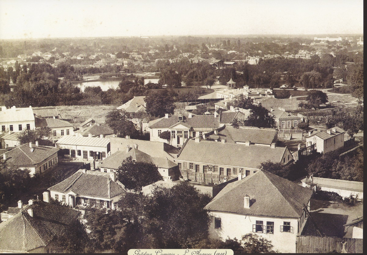 Grădina Cişmigiu